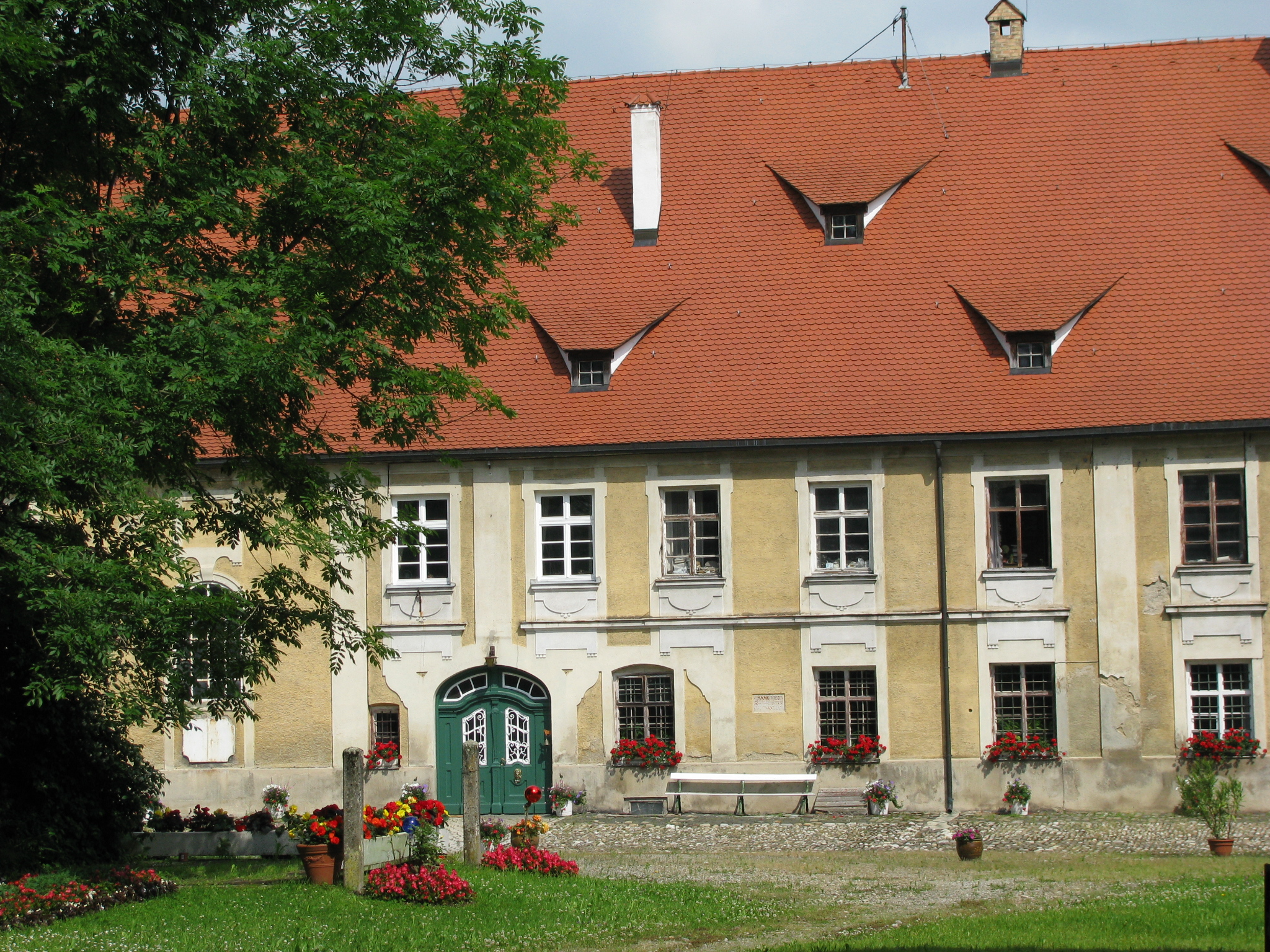 Schloss Günzach im Landkreis Ostallgäu, eine dreiflügelige Anlage mit Walmdächern